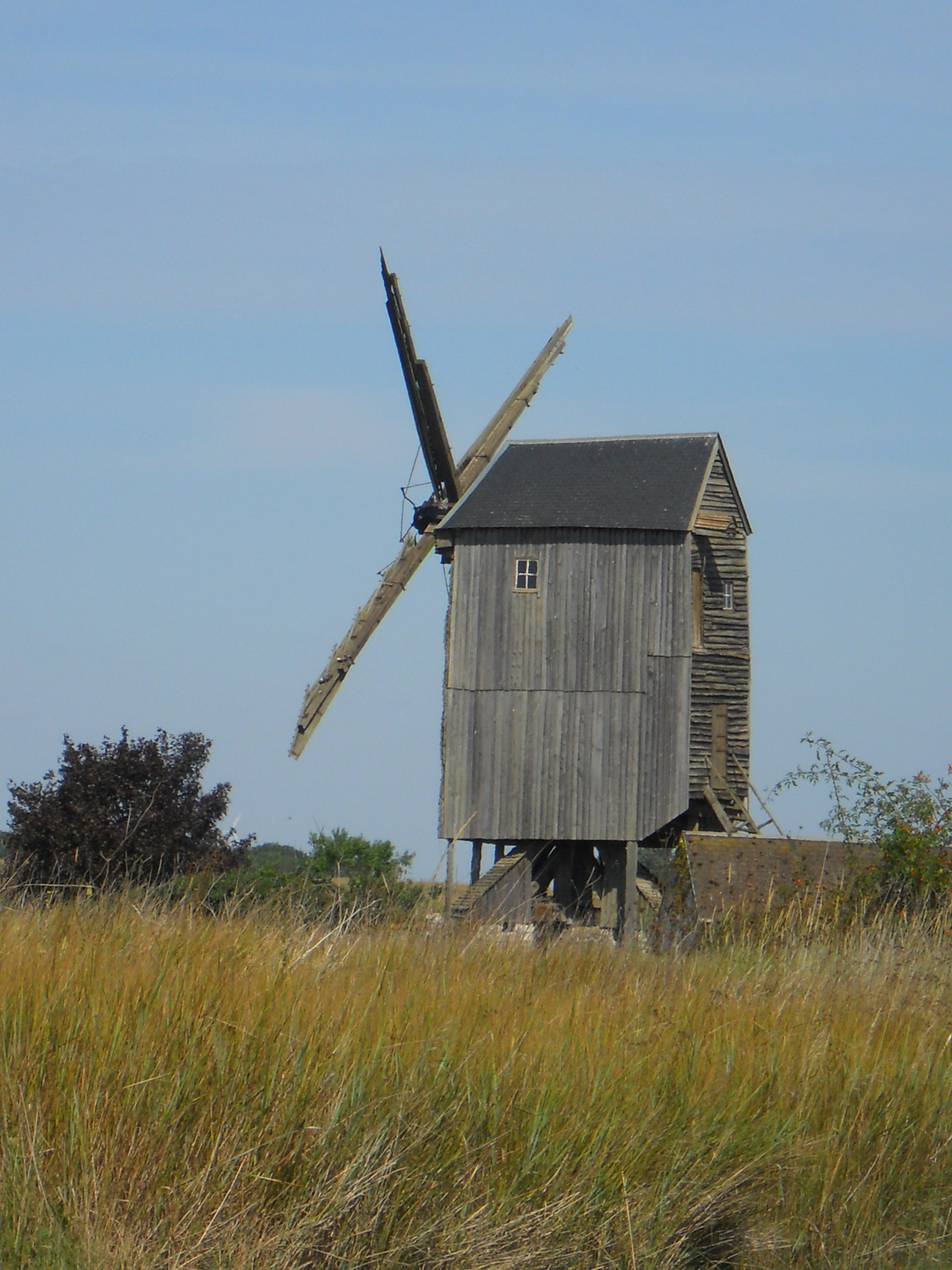 Moulin à vent Richard, (Inscrit, 1988) .